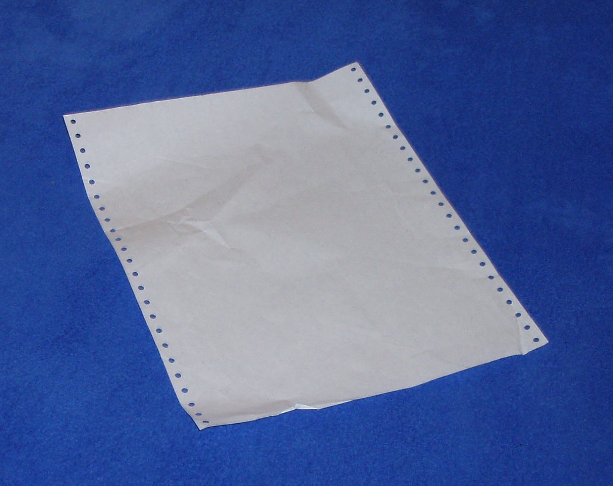 Endlospapier